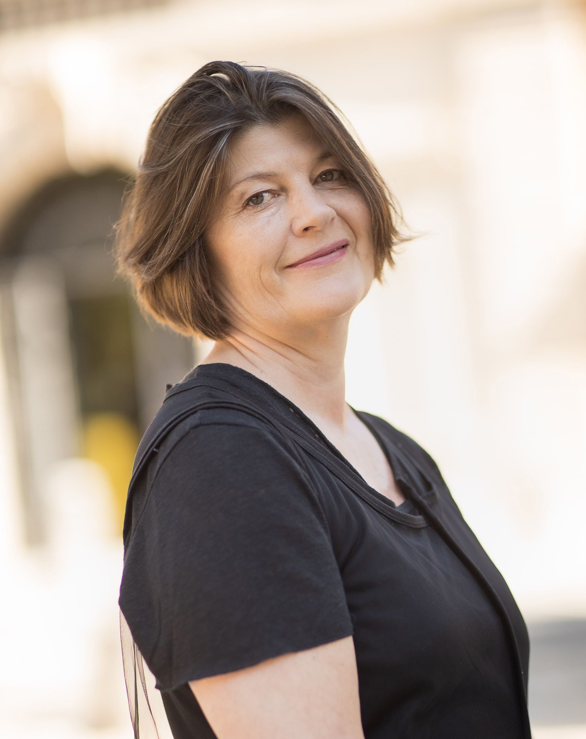 Foto von Julia Draganovic, Leiterin der Deutschen Akademie Rom Villa Massimo, 2019.